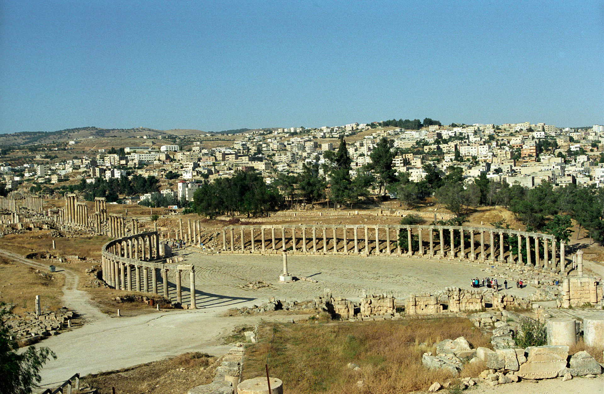 Jerash, Jordan